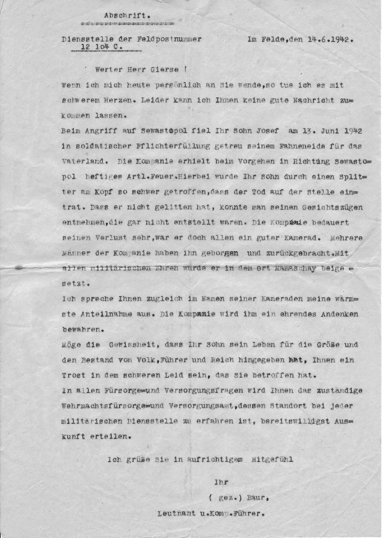 Todesnachricht an die Eltern von Josef Gierse vom Kompanieführer Baur der 6. Kompanie des Infantrie-Regiments 437 der 132. Infantrie-Division.